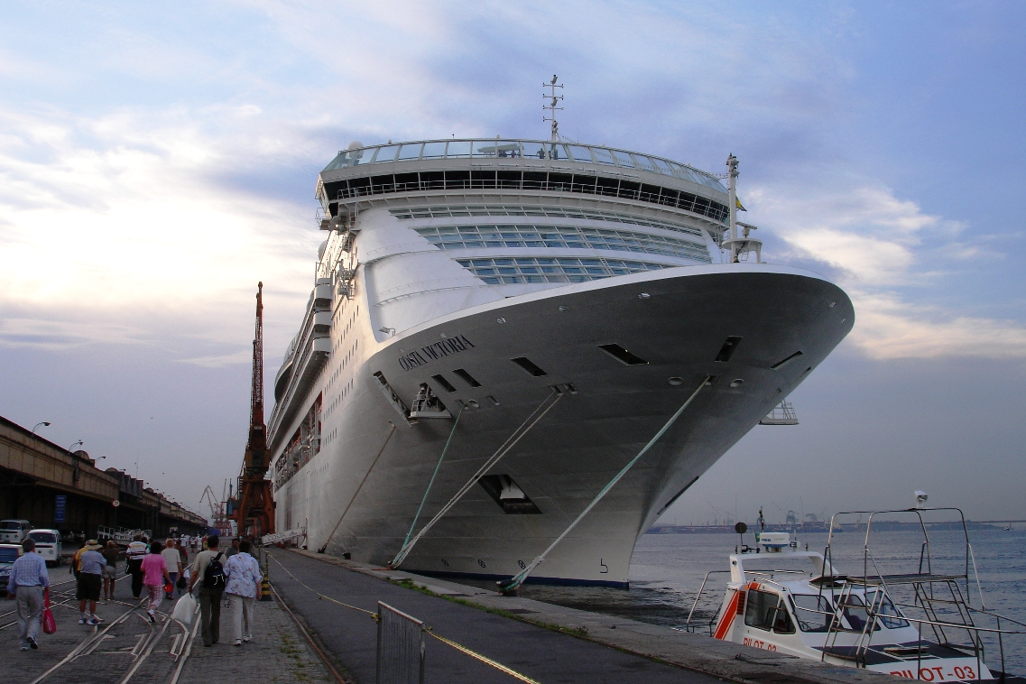 Costa Victoria in Rio de Janeiro